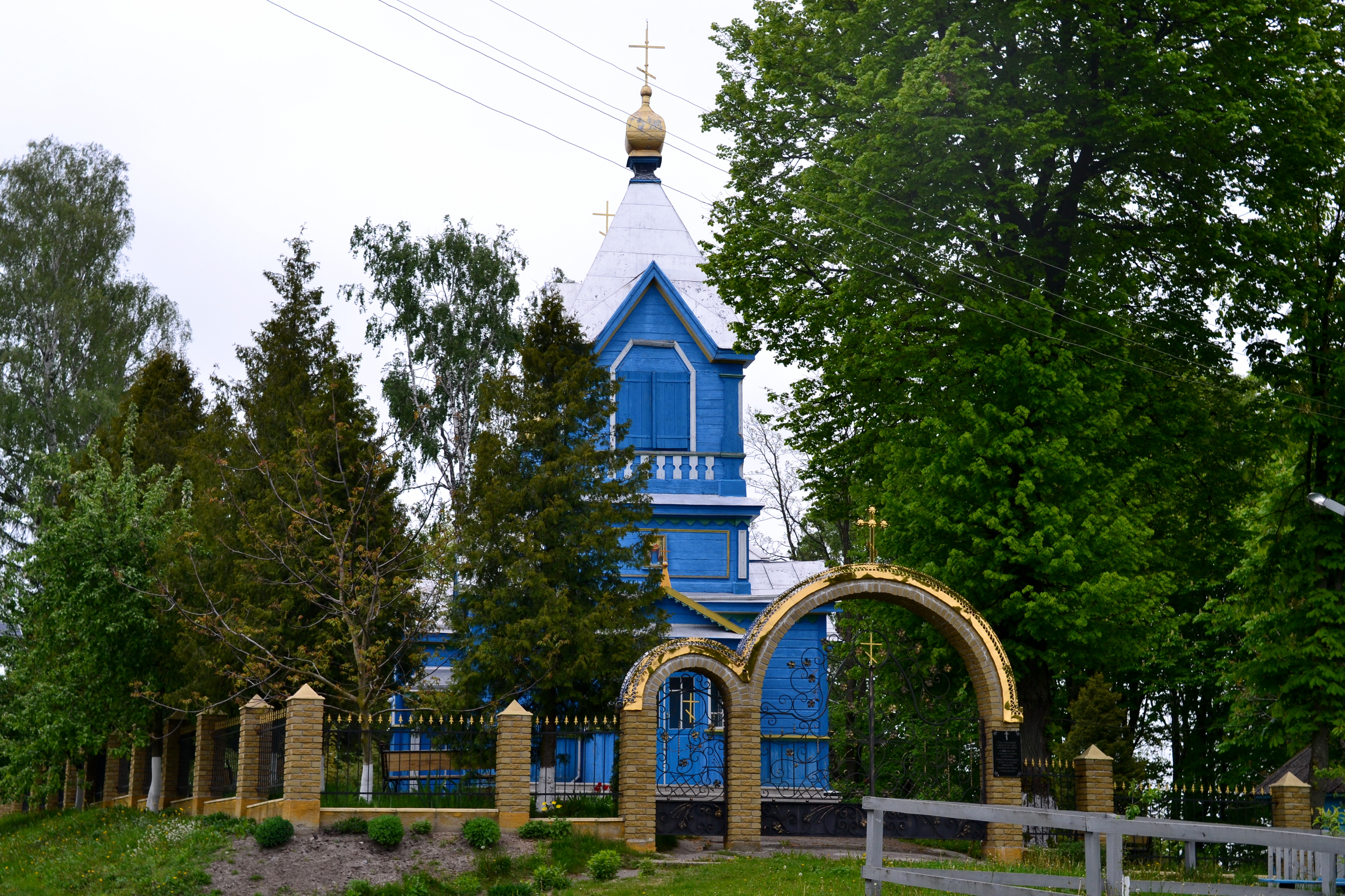 Покровська церква (дер.) (1900 рік) - вигляд із заходу - Озеро Ківерцівський район Волинська область Україна